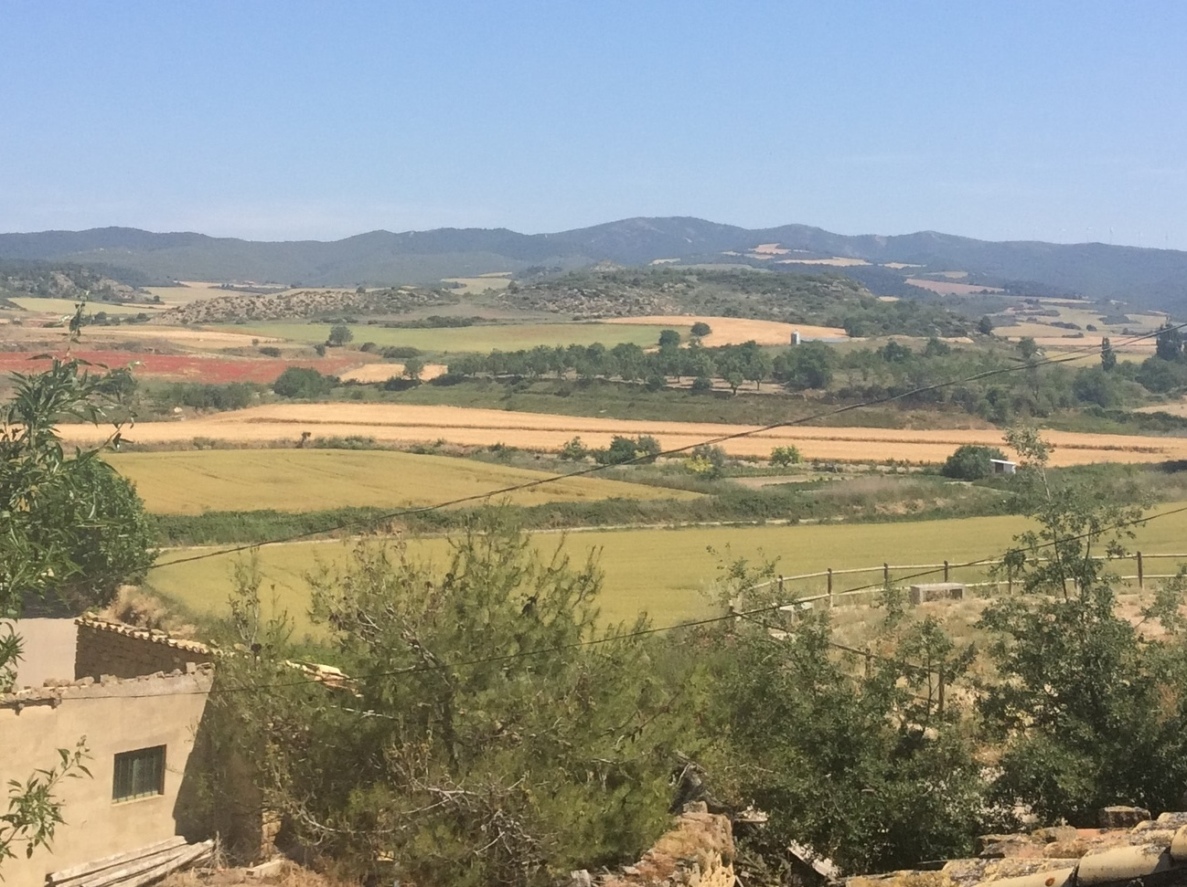 Yacimiento arqueológico de Cabeza Ladrero visto desde la torre de Sofuentes (Zaragoza)